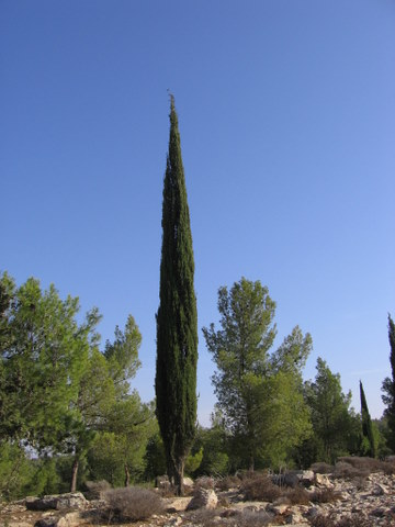 cypress (Cupressus sempervirens)